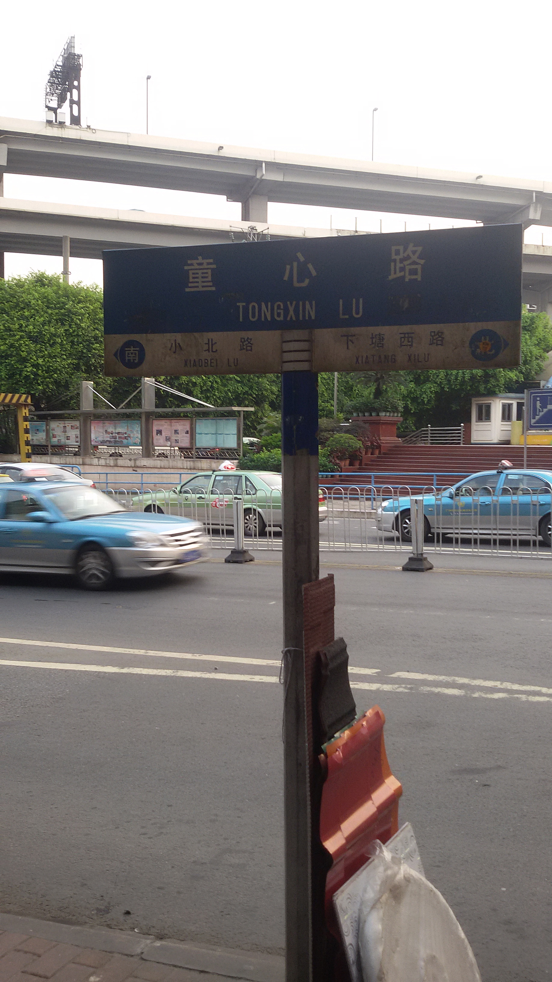 粵語: 童心路嘅路牌